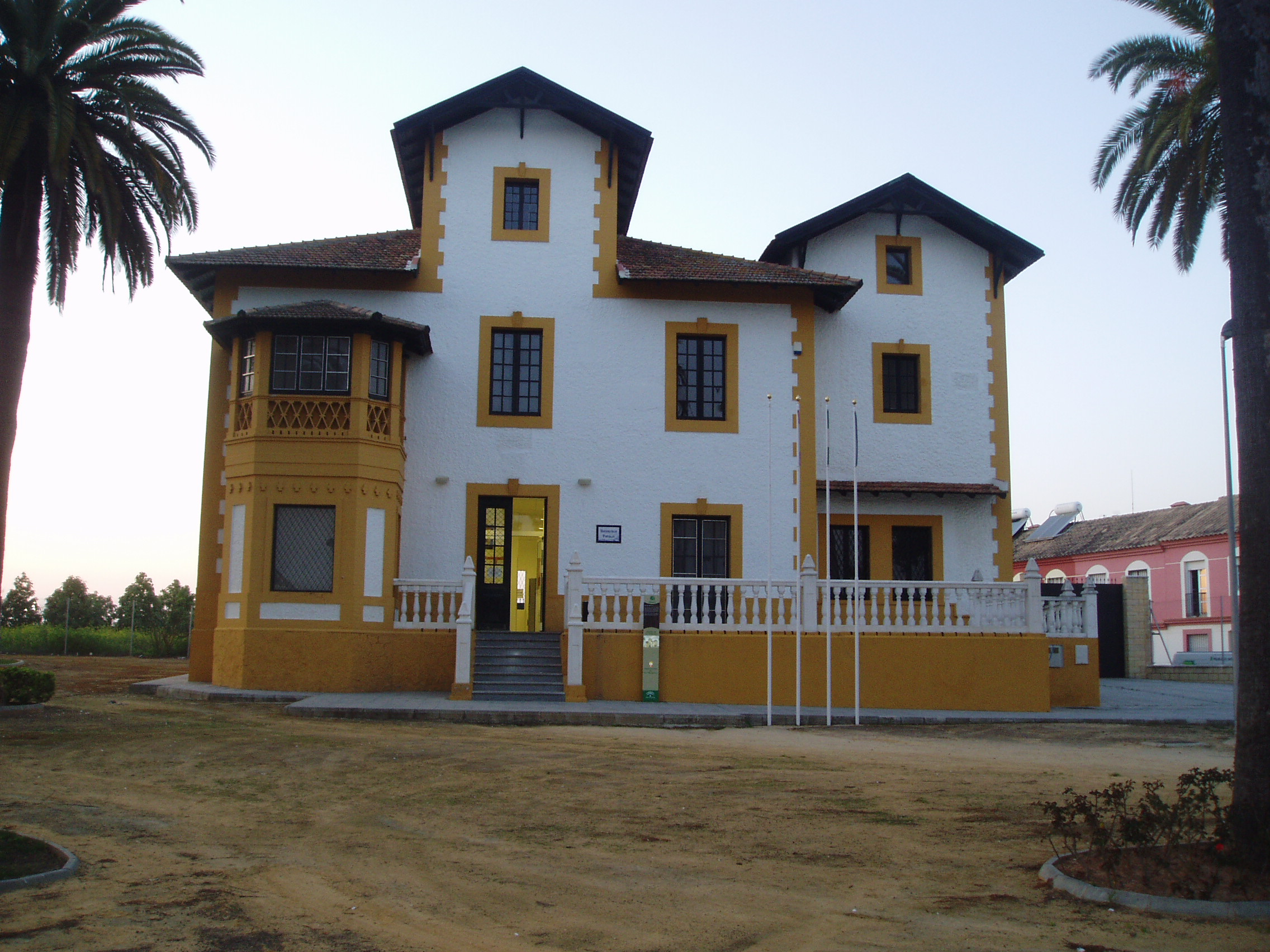 Casa de la Huerta de la Princesa actual sede de la Universidad Popular de Dos Hermanas (Sevilla)